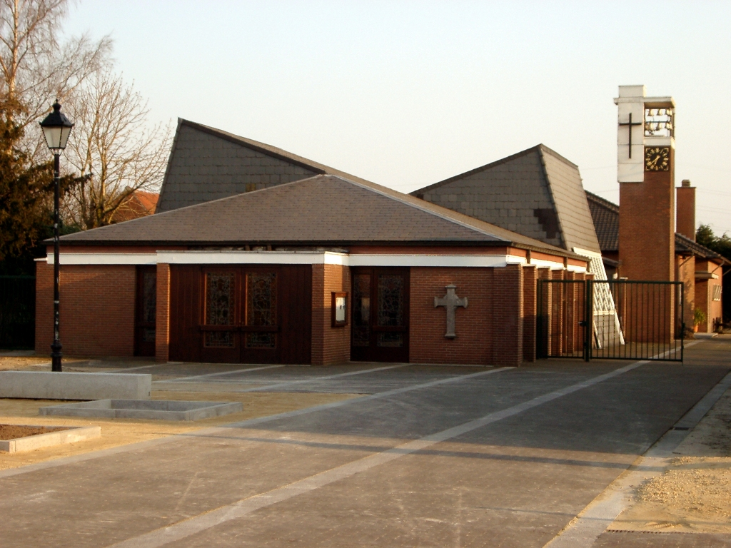 Kerkgebouw Zele-Durmen